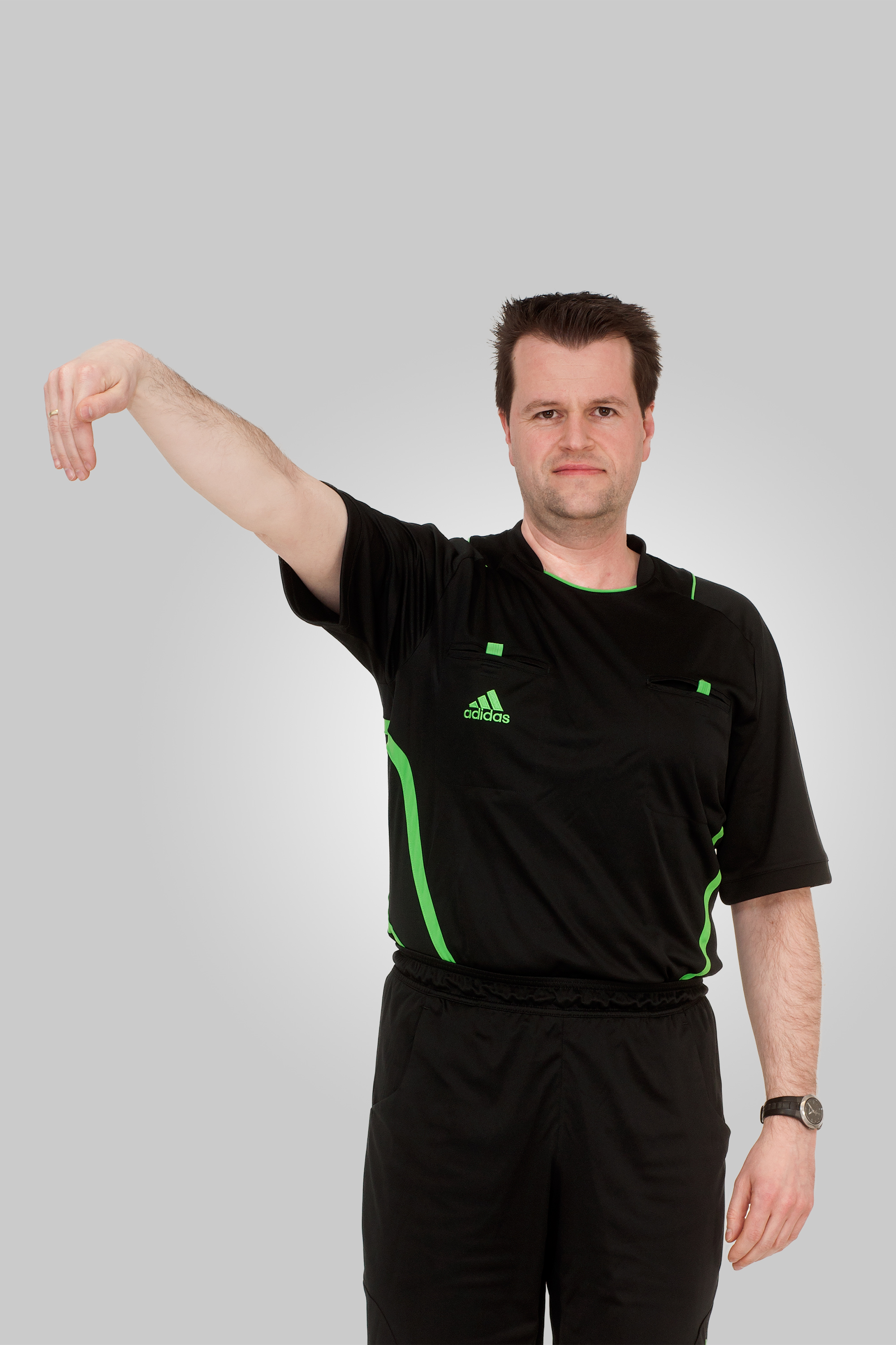 Internationale Handballregeln Handzeichen 08 Abwurf